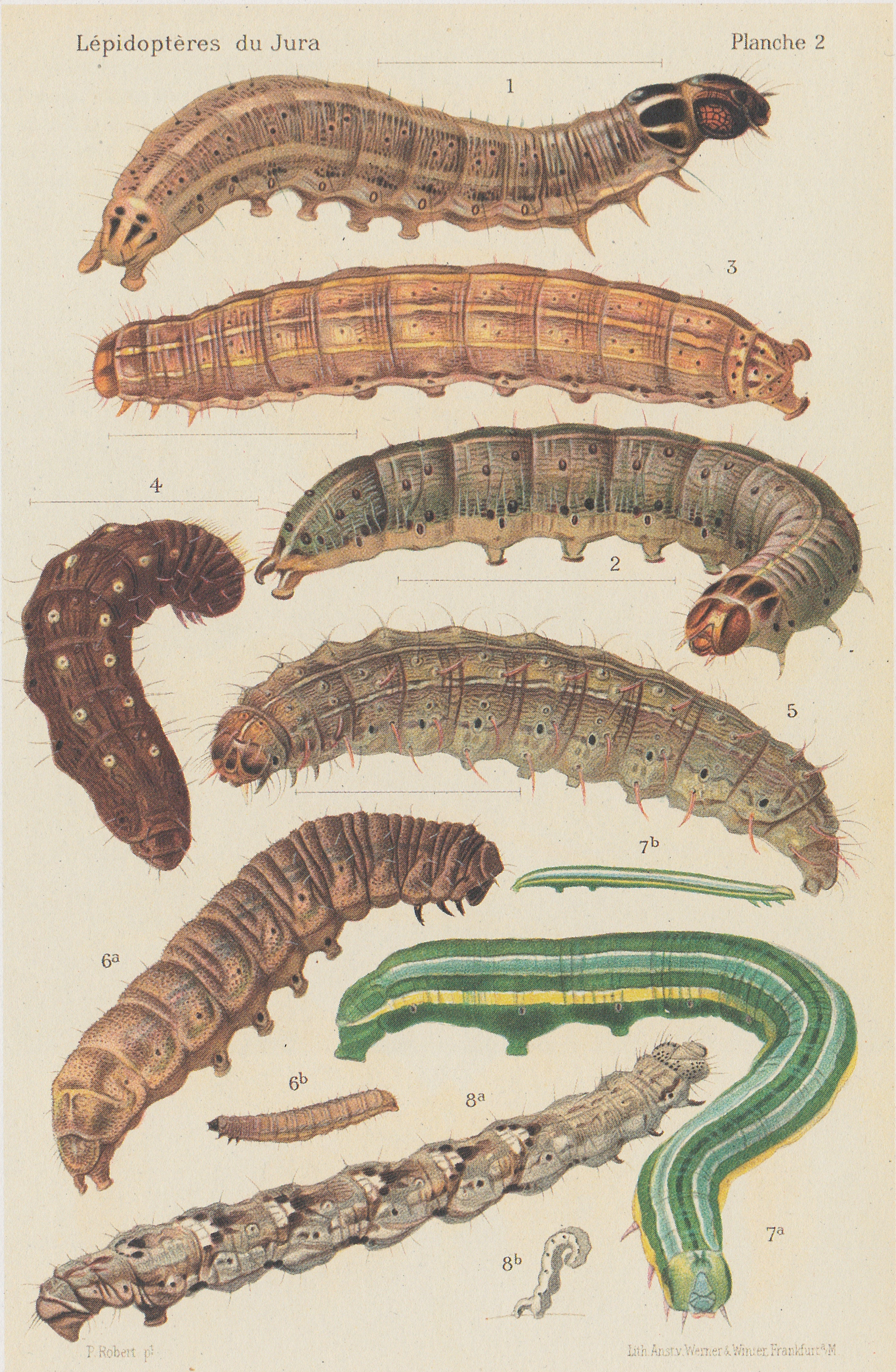 Illustration von Schmetterlingsraupen aus dem Jura: 1: Apamea sordens (Hufnagel, 1766) 2: Apamea epomidion (Haworth, 1809) 3: Apamea illyria Freyer, 1846 4: Hoplodrina respersa (Denis & Schiffermüller, 1775) 5: Hoplodrina octogenaria (Goeze, 1781) 6a: Athetis gluteosa (Treitschke, 1835), vergrösserte Darstellung 6b: Athetis gluteosa (Treitschke, 1835), natürliche Grösse 7a: Brauner Nadelwald-Spanner (Pungeleria capreolaria), vergrösserte Darstellung 7b: Brauner Nadelwald-Spanner (Pungeleria capreolaria), natürliche Grösse 8a: Tuffsteinspanner (Coenotephria tophaceata), vierfache Vergrösserung 8b: Tuffsteinspanner (Coenotephria tophaceata), natürliche Grösse